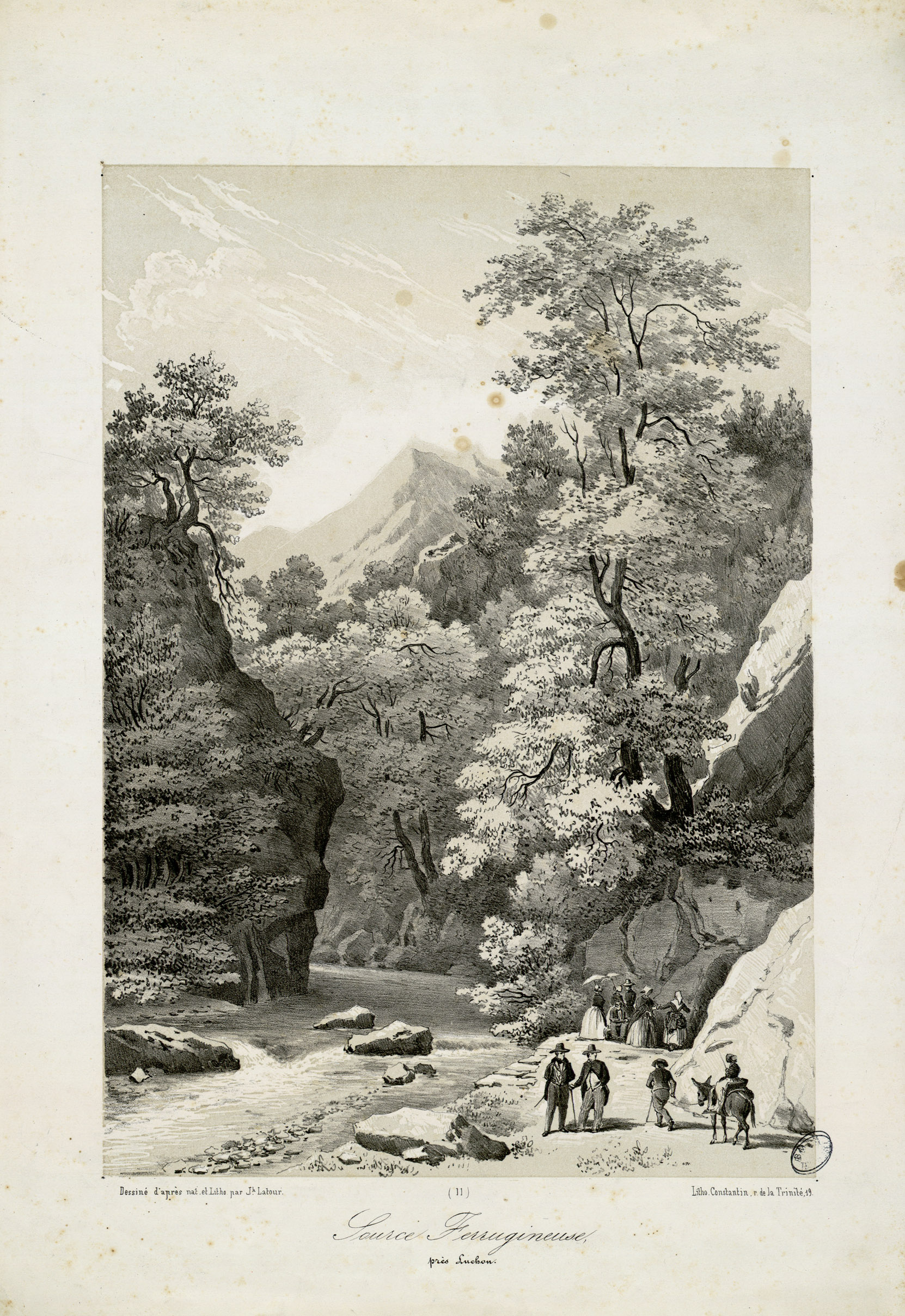 Fait partie d'un recueil de 17 lithographies en camaïeu et 1 pl. en couleurs. Pl. 1 à 12 dessinées et lithographiées par Latour, pl. 13 à 18 dessinées et lithographiées par Eugène Fil. Ancely, René (1876 - 1966). Possesseur